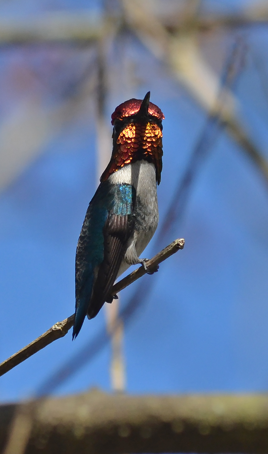 Bee hummingbird